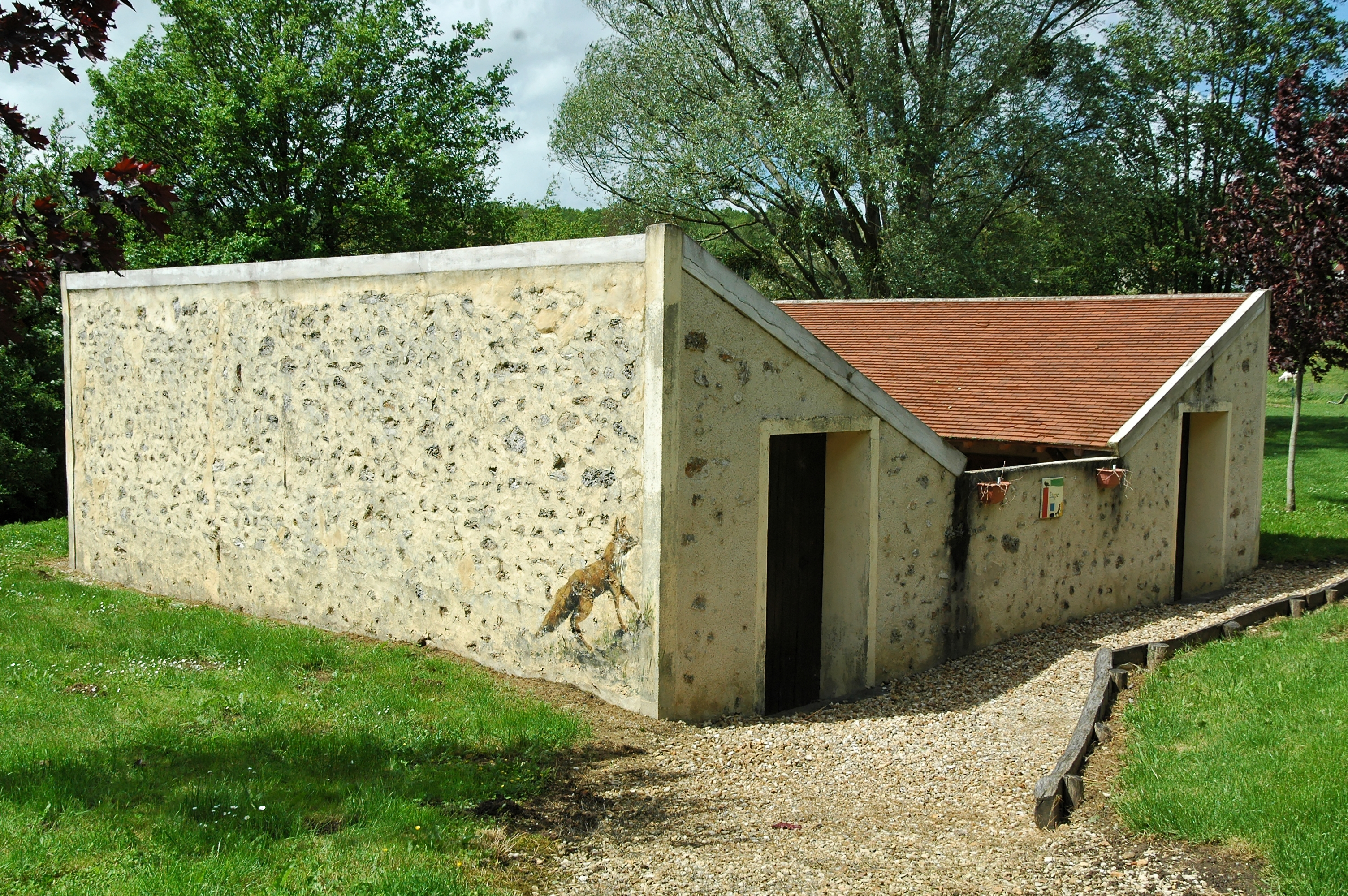 Lavoir de la Celle-sous-Montmirail.